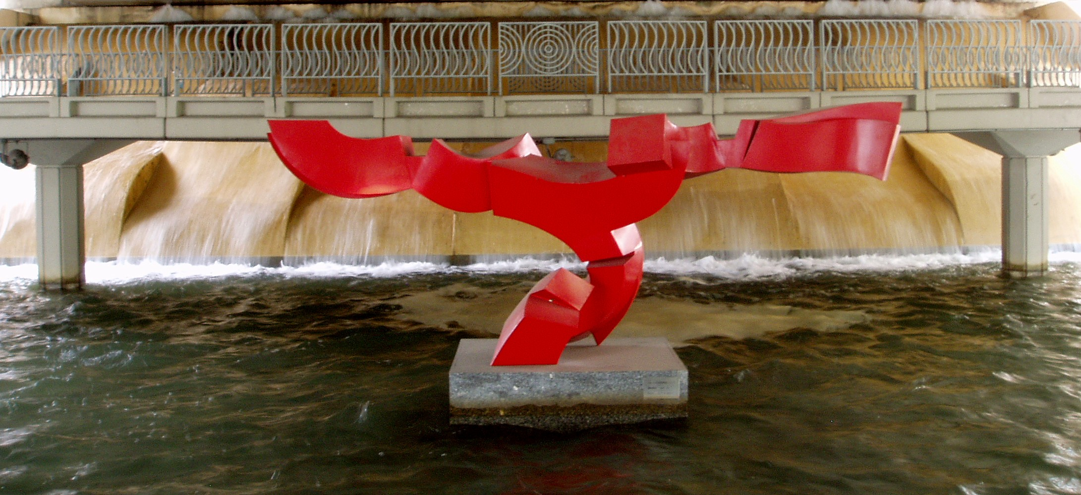 Mediterránea. Martín Chirino. Museo Arte Público. Madrid. España.